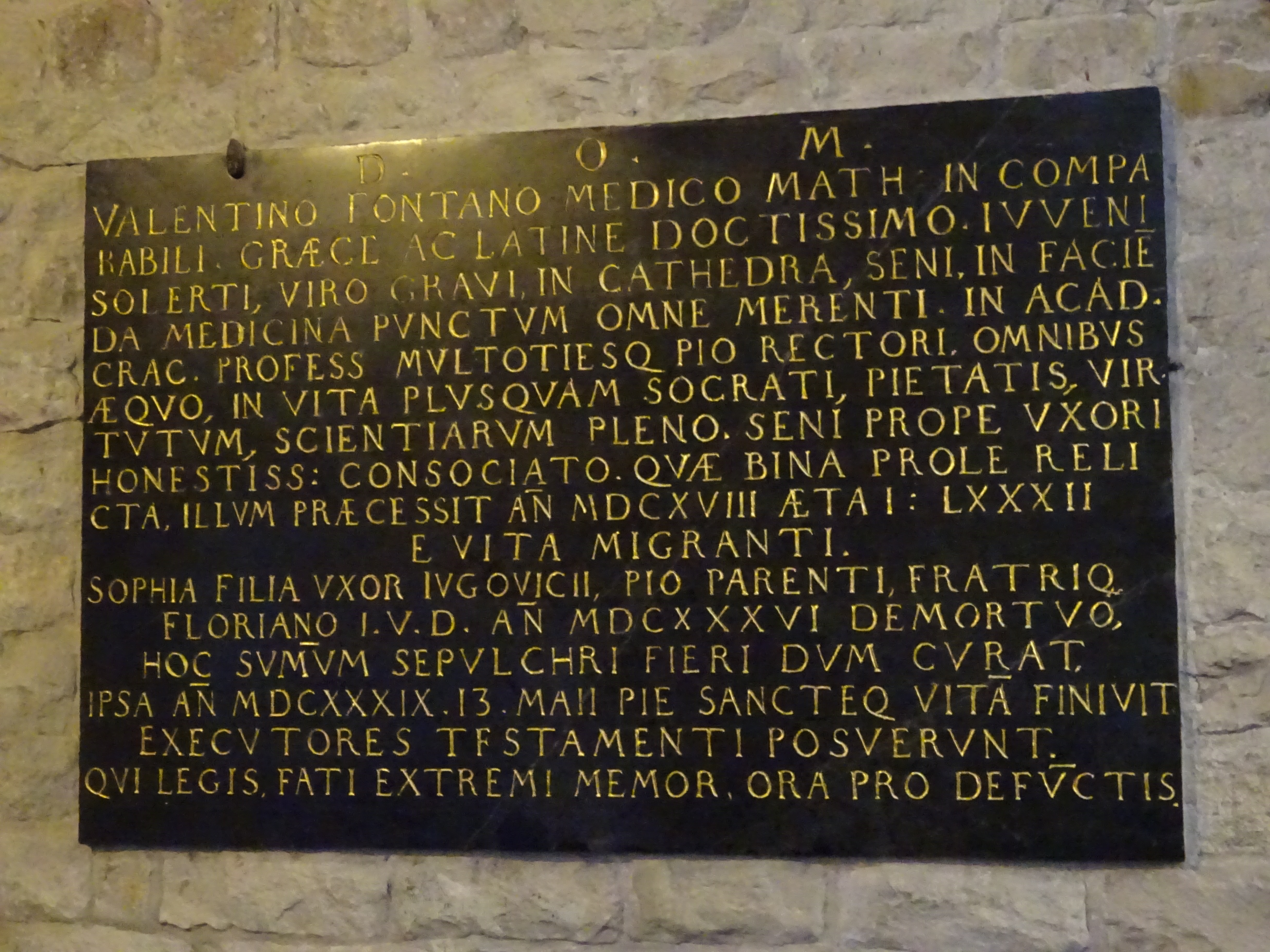 Epitafium grobowe Walentego Fontany w Kościele św. Wojciecha w Krakowie na Rynku Głównym. 2018